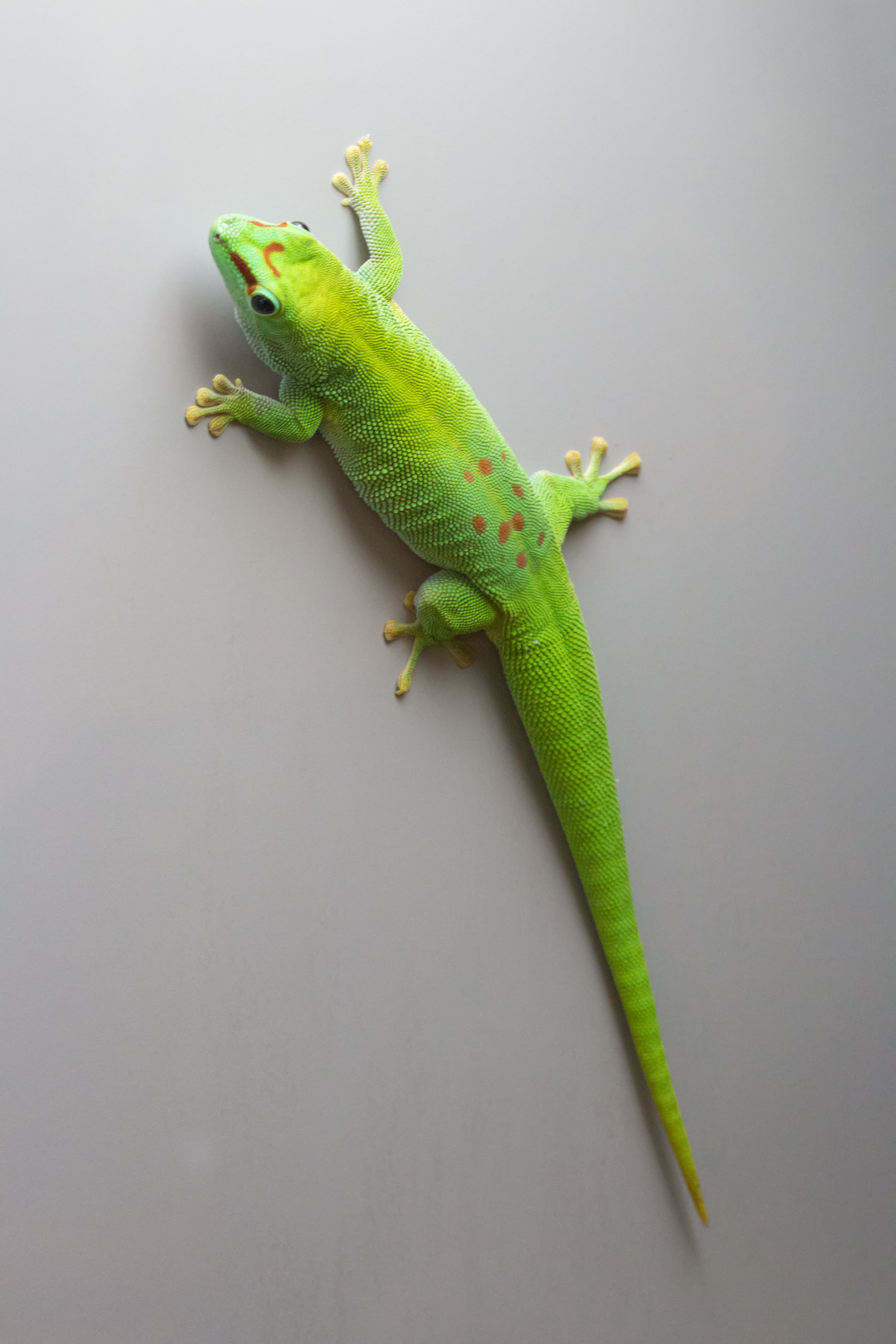 Großer Madagaskar-Taggecko (Phelsuma grandis), Zoo Wilhelma Stuttgart